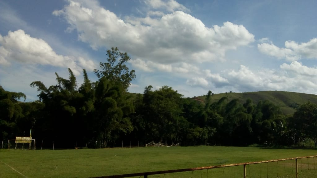 Estádio Augusto Ferreira